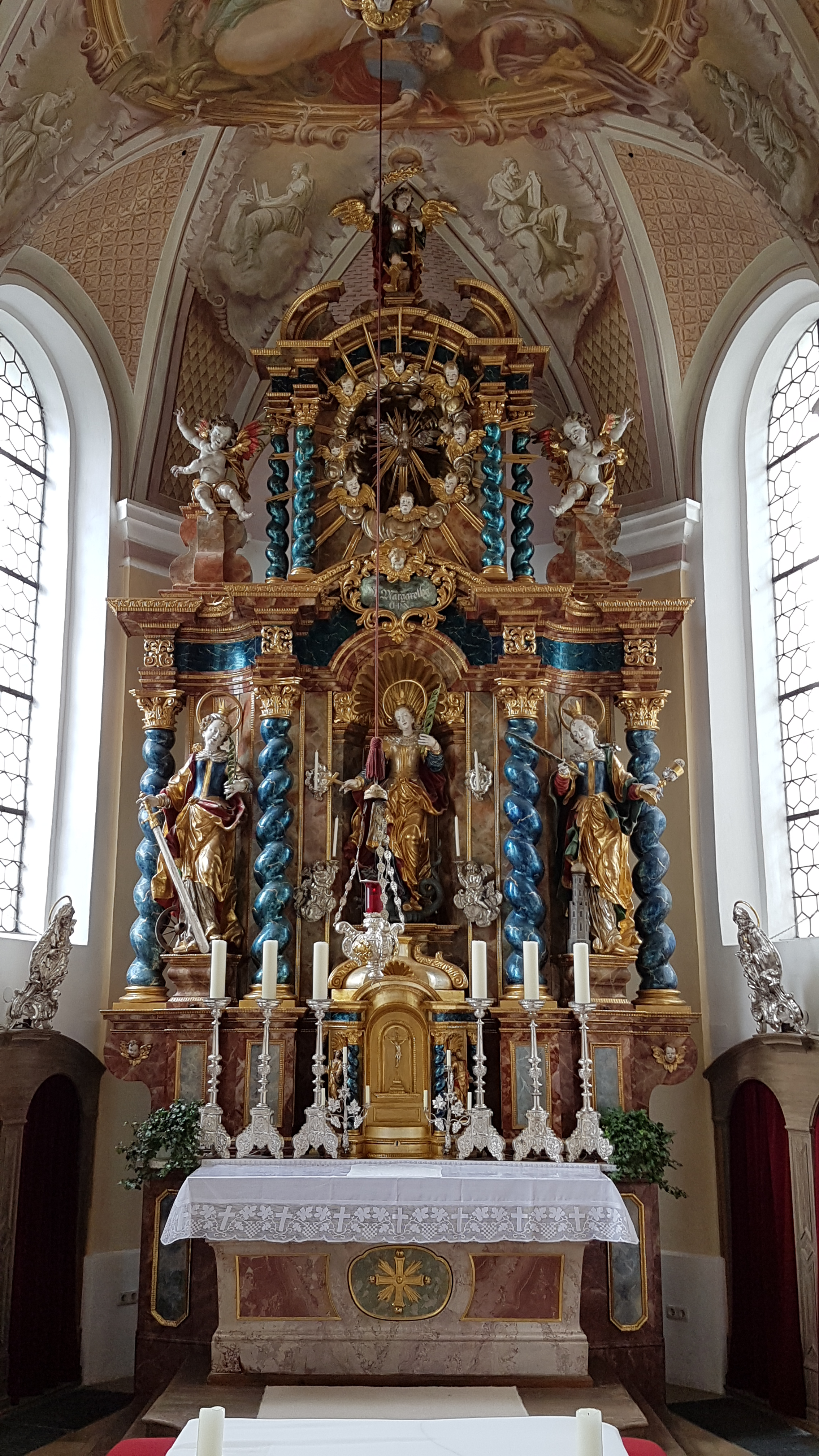 Issing (Vilgertshofen), Pfarrkirche St. Margaretha, spätbarocker Hochaltar (1720/28) mit figürlicher Ausstattung von Lorenz und Johann Luidl.